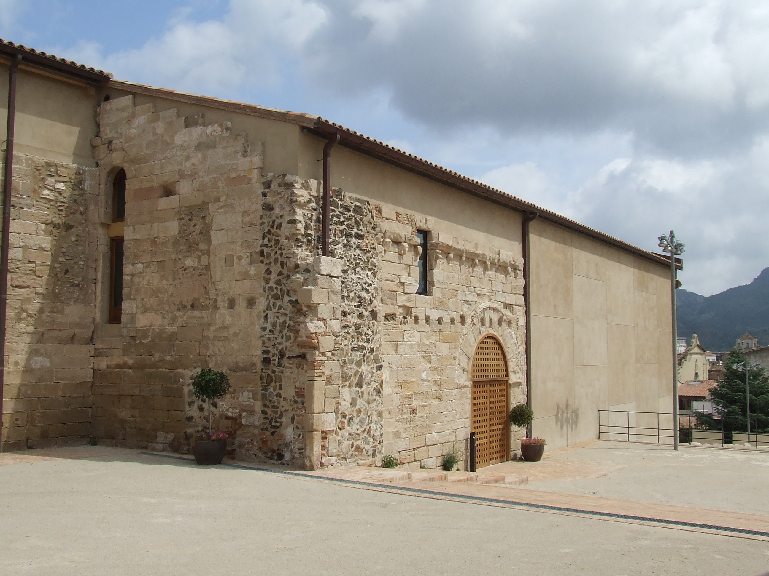 Església romànica del Castell de Falset.